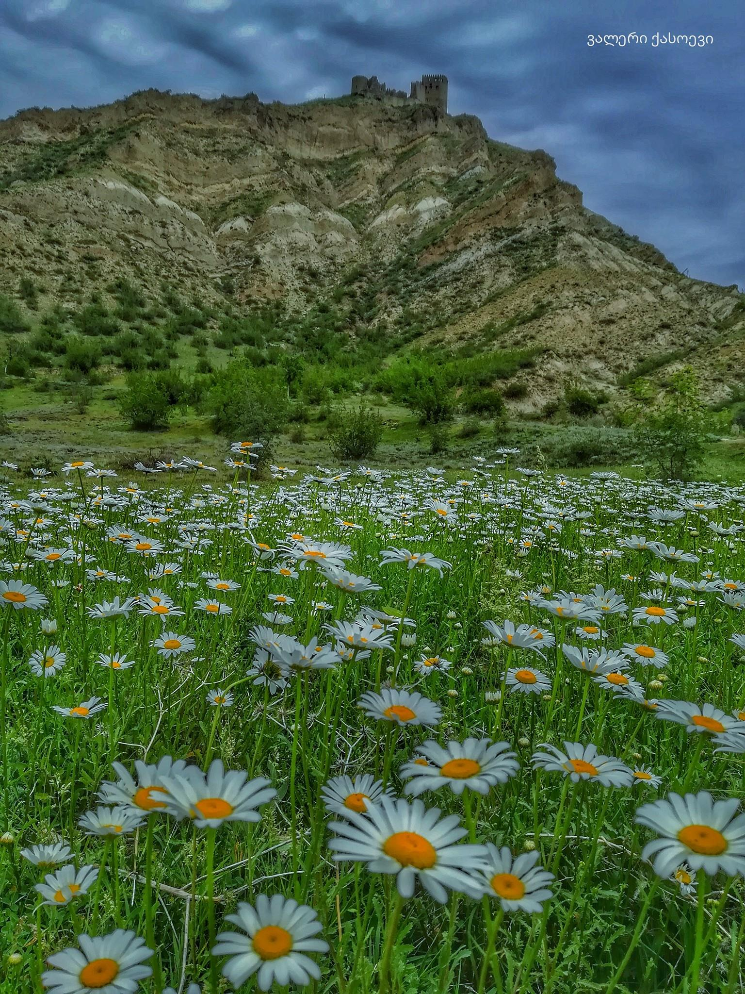 ქსნის ციხე